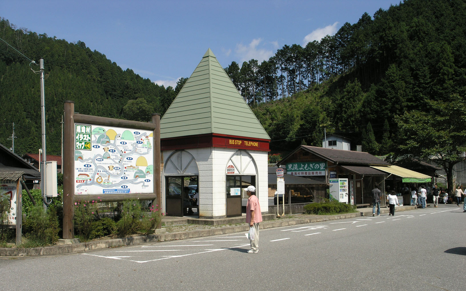 道の駅吉野路_黒滝 (奈良県吉野郡黒滝村) 2008年9月撮影。 機材：C8080WZ 撮影者：Kansai explorer